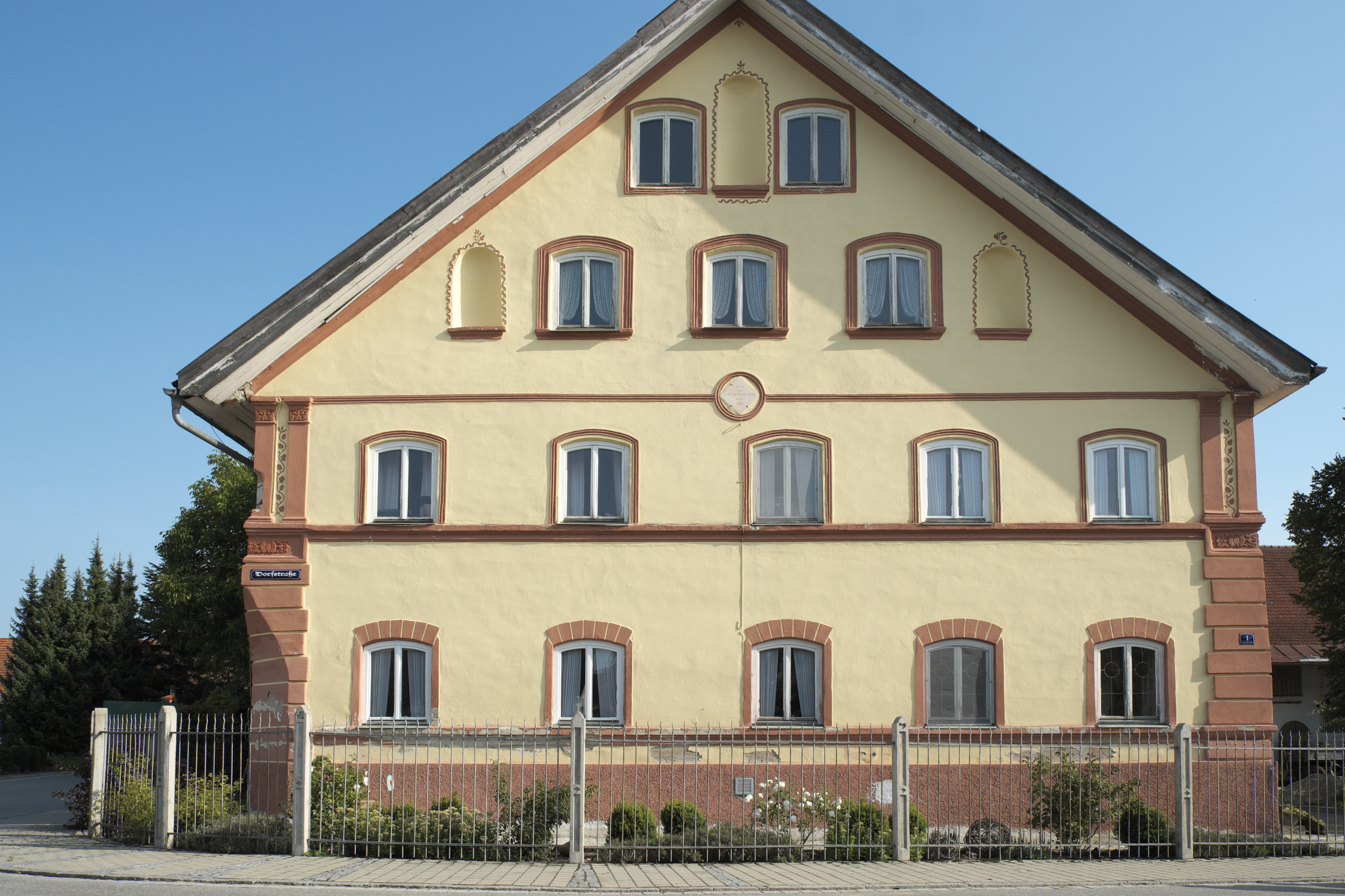 Wohnstallhaus, Dorfstraße 1, in Grucking (Fraunberg) im Landkreis Erding (Bayern/Deutschland)